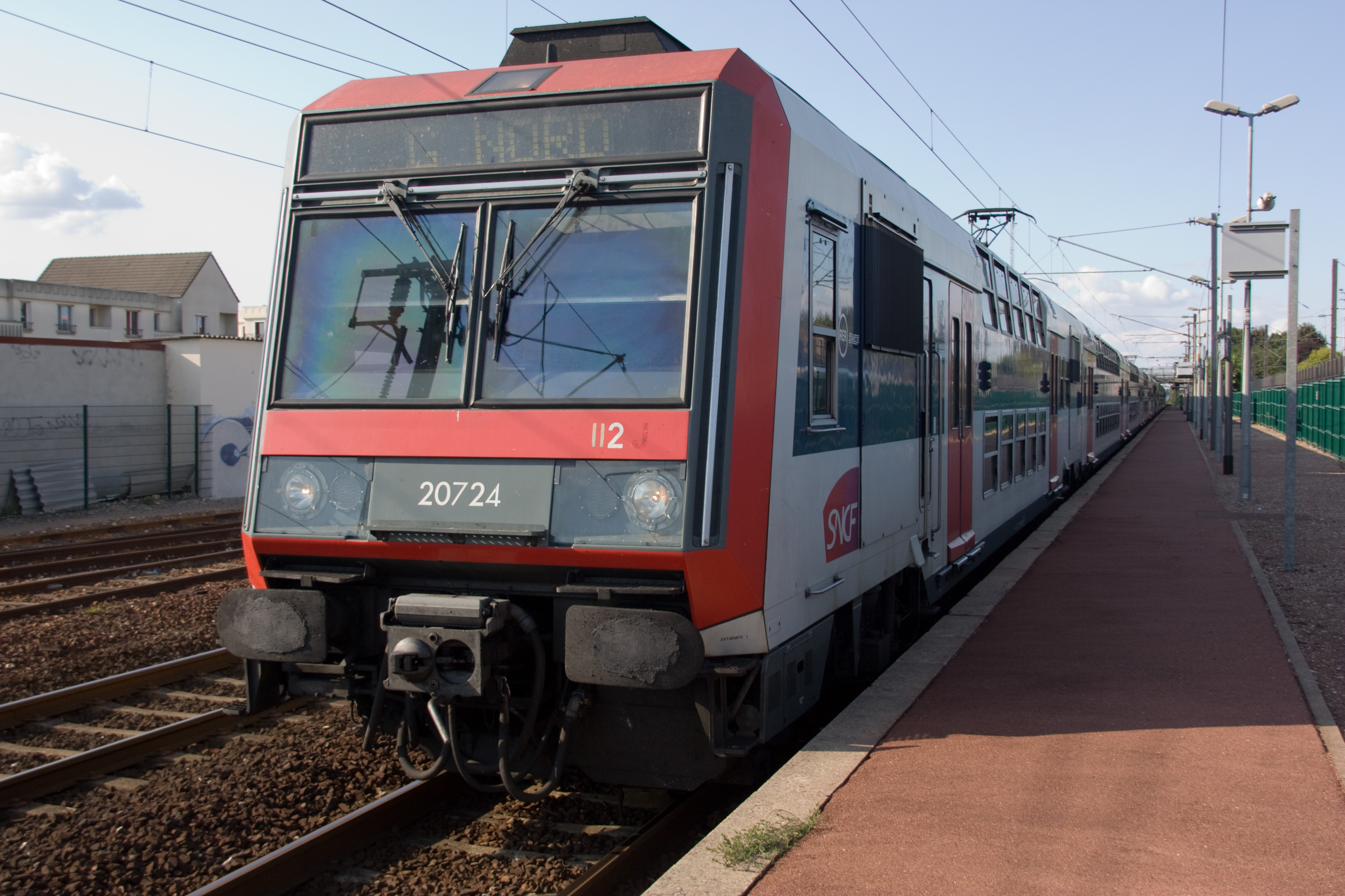 Gare de Survilliers - Fosses, département du Val-d'Oise, France